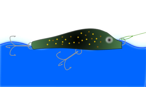 Tekening van een jerkbait, let op de mond die plat en gebogen is, gefreesd voor een luide 'splash' als hij wordt binnengehaald.